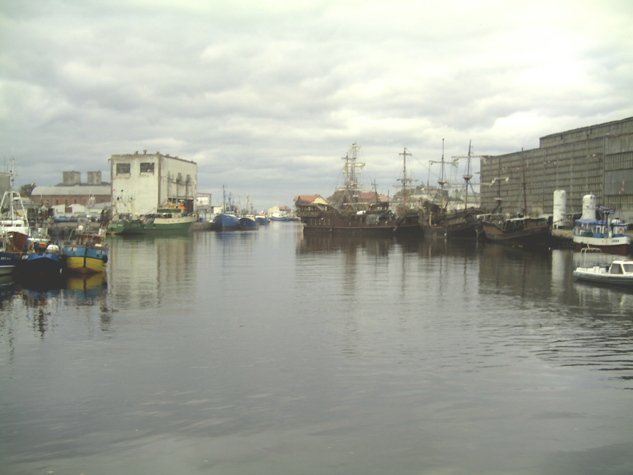 Ustka, harbour